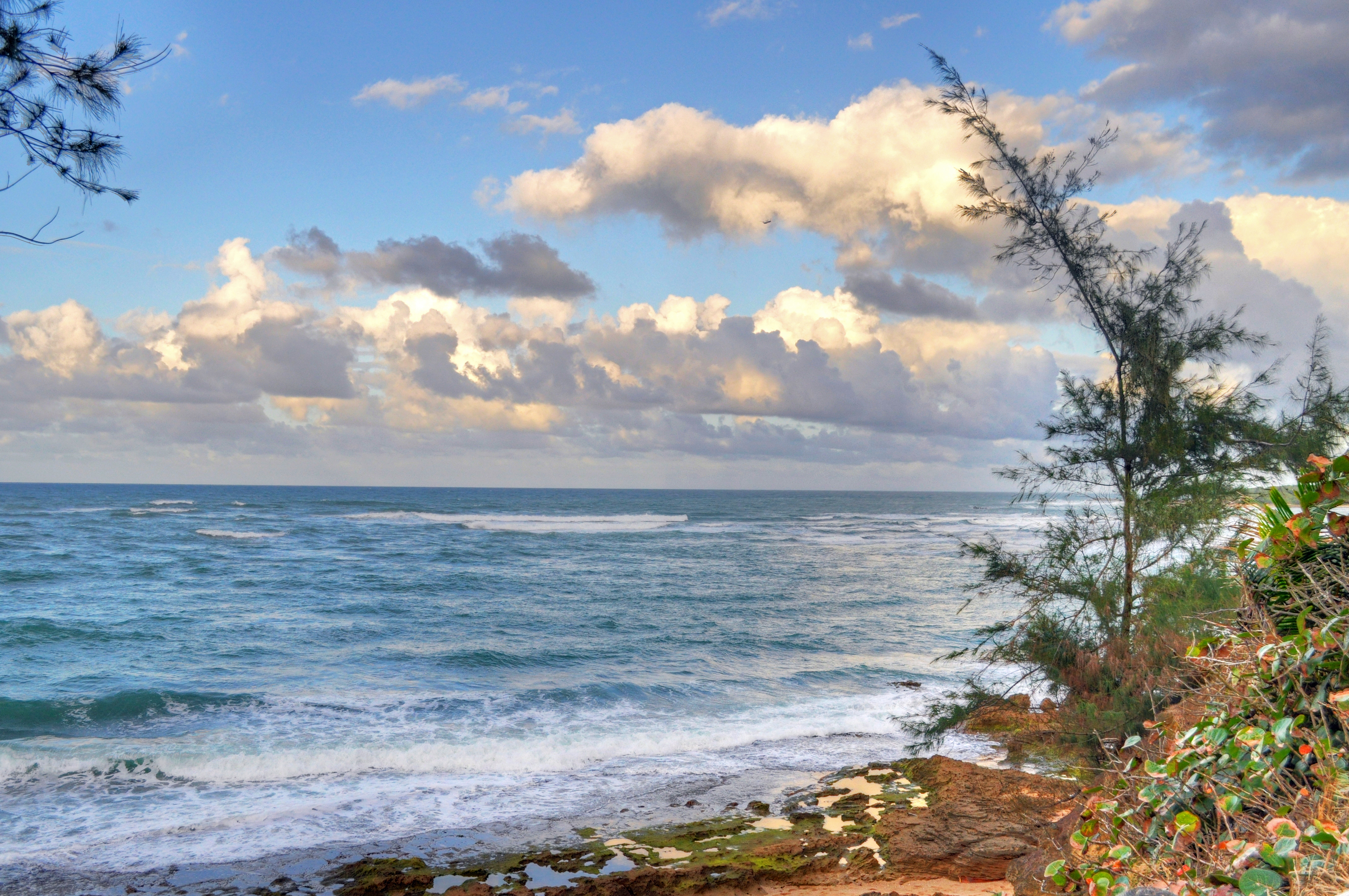 Piñones